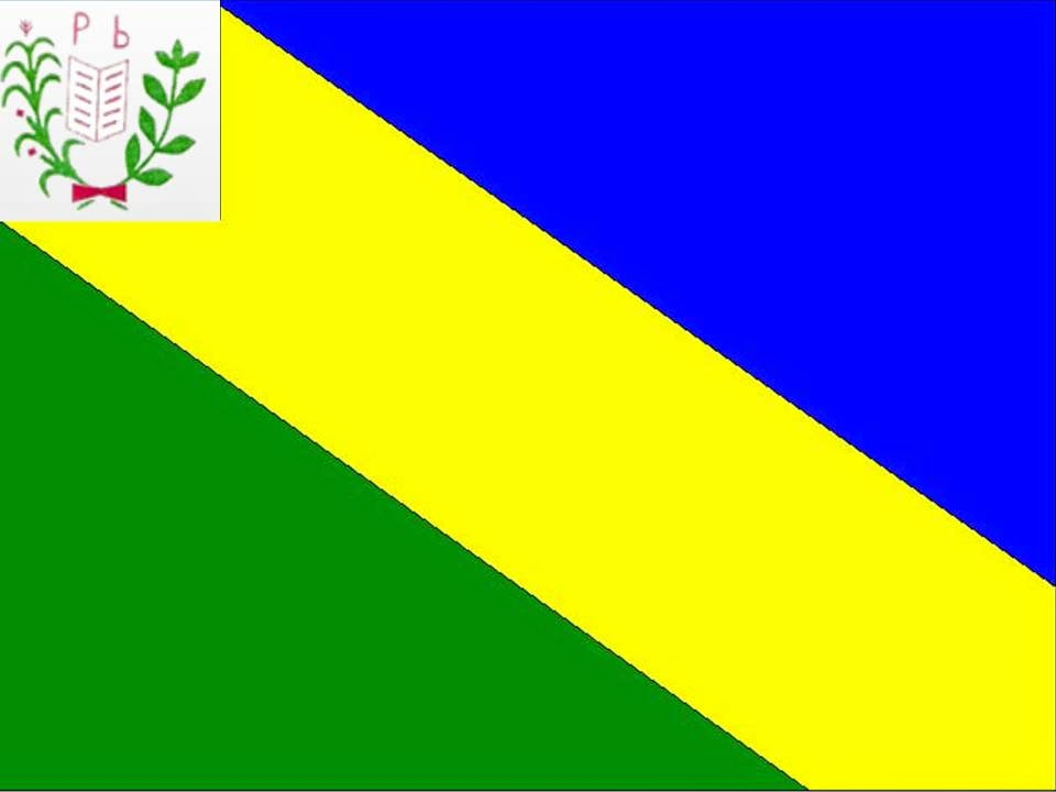 Boquira e sua atual bandeira